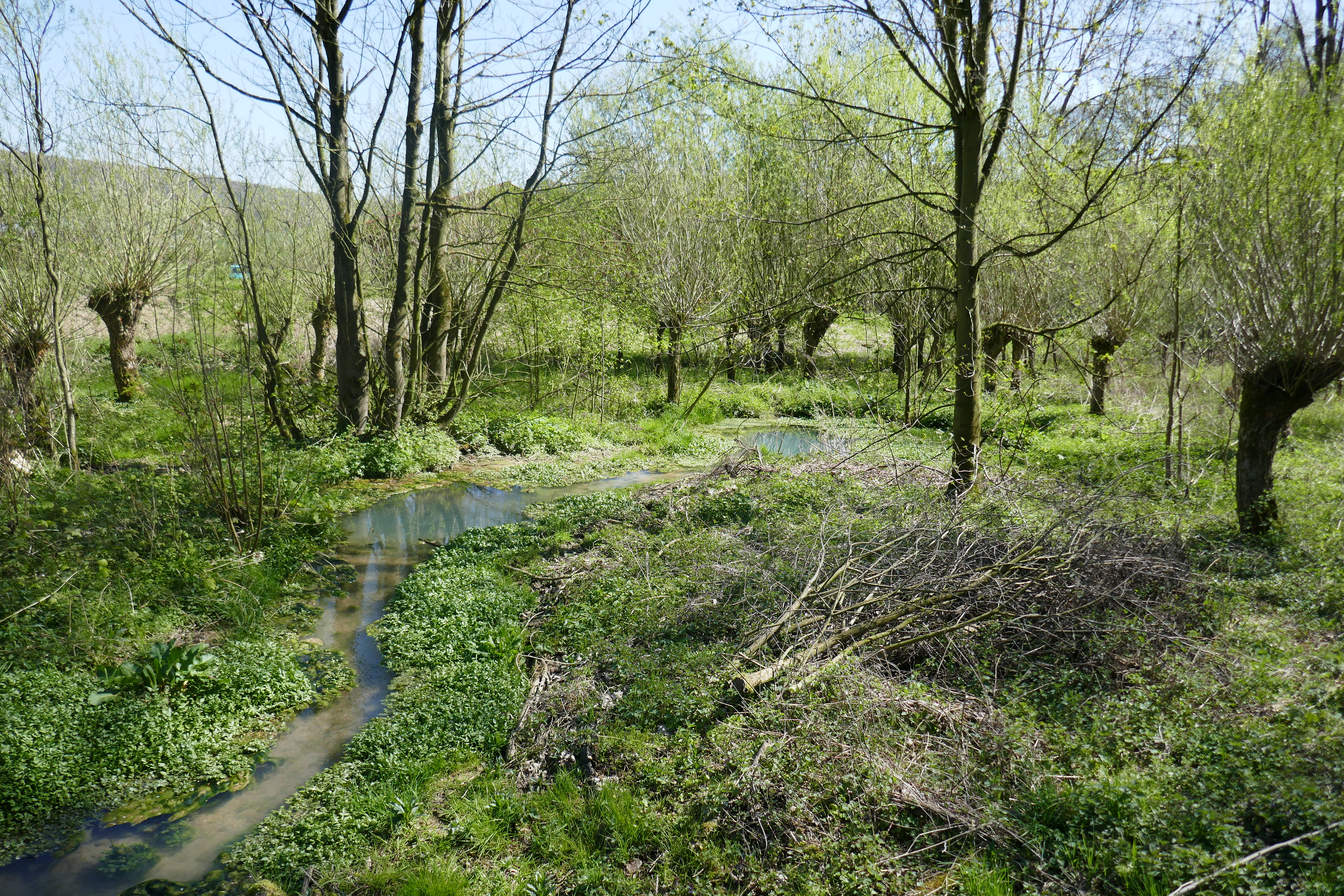 Gellinghausener Quelle in Gellinghausen zwischen Kirchborchen und Etteln